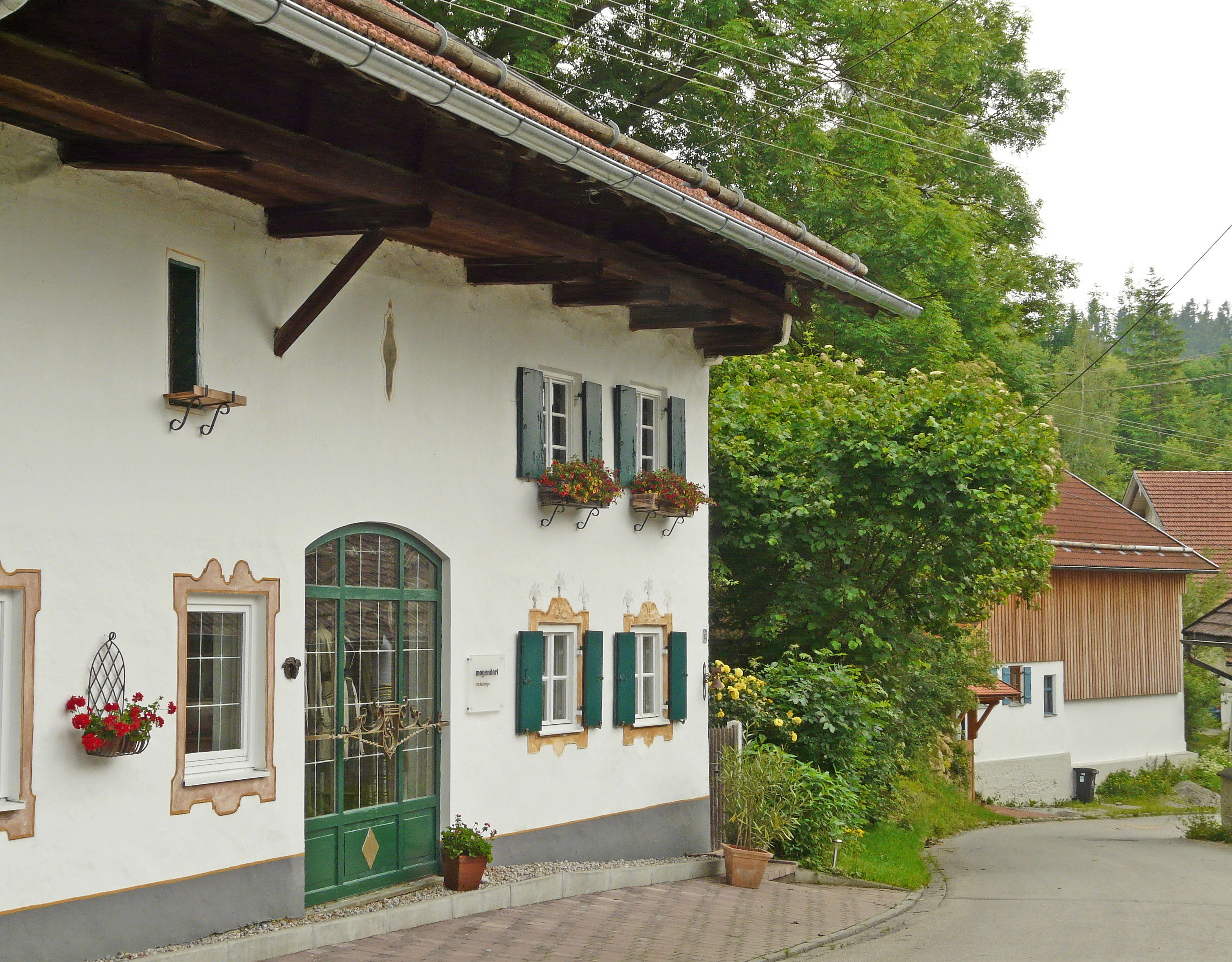 Bergstr. 20 in Frankenhofen, Kaltental